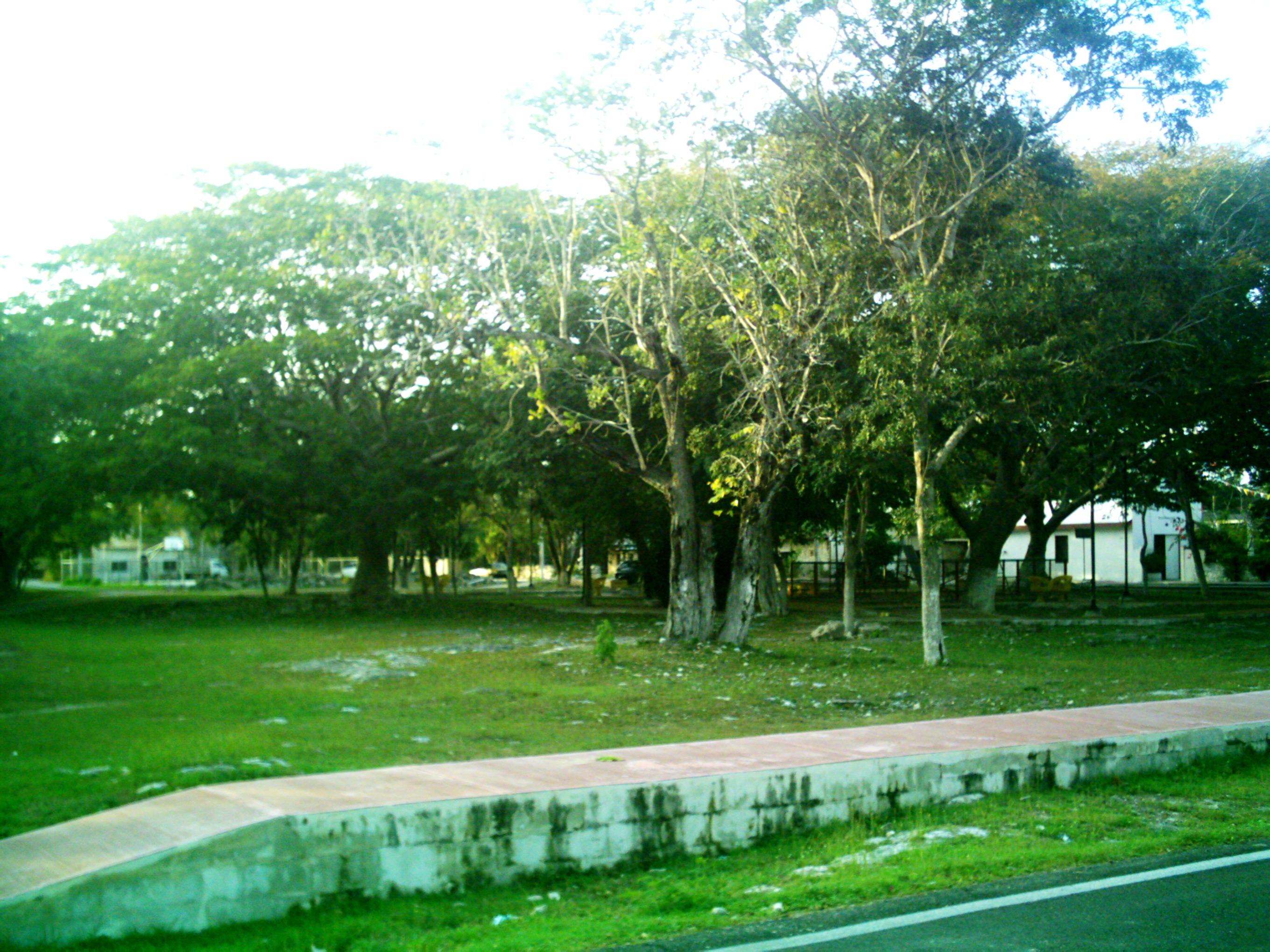 Parque principal de Suytunchén, Yucatán.